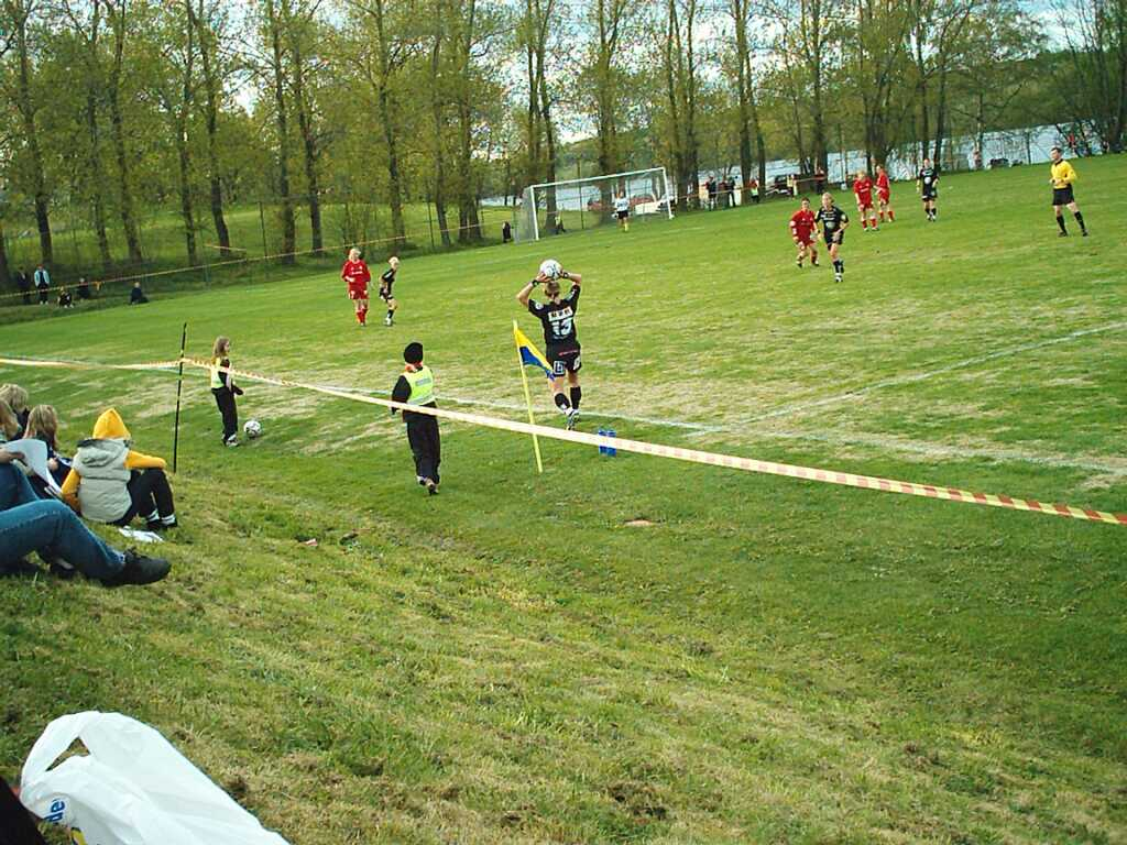 Malands IP Match i Svenska Cupen för damer mellan Sund IF och Umeå IK